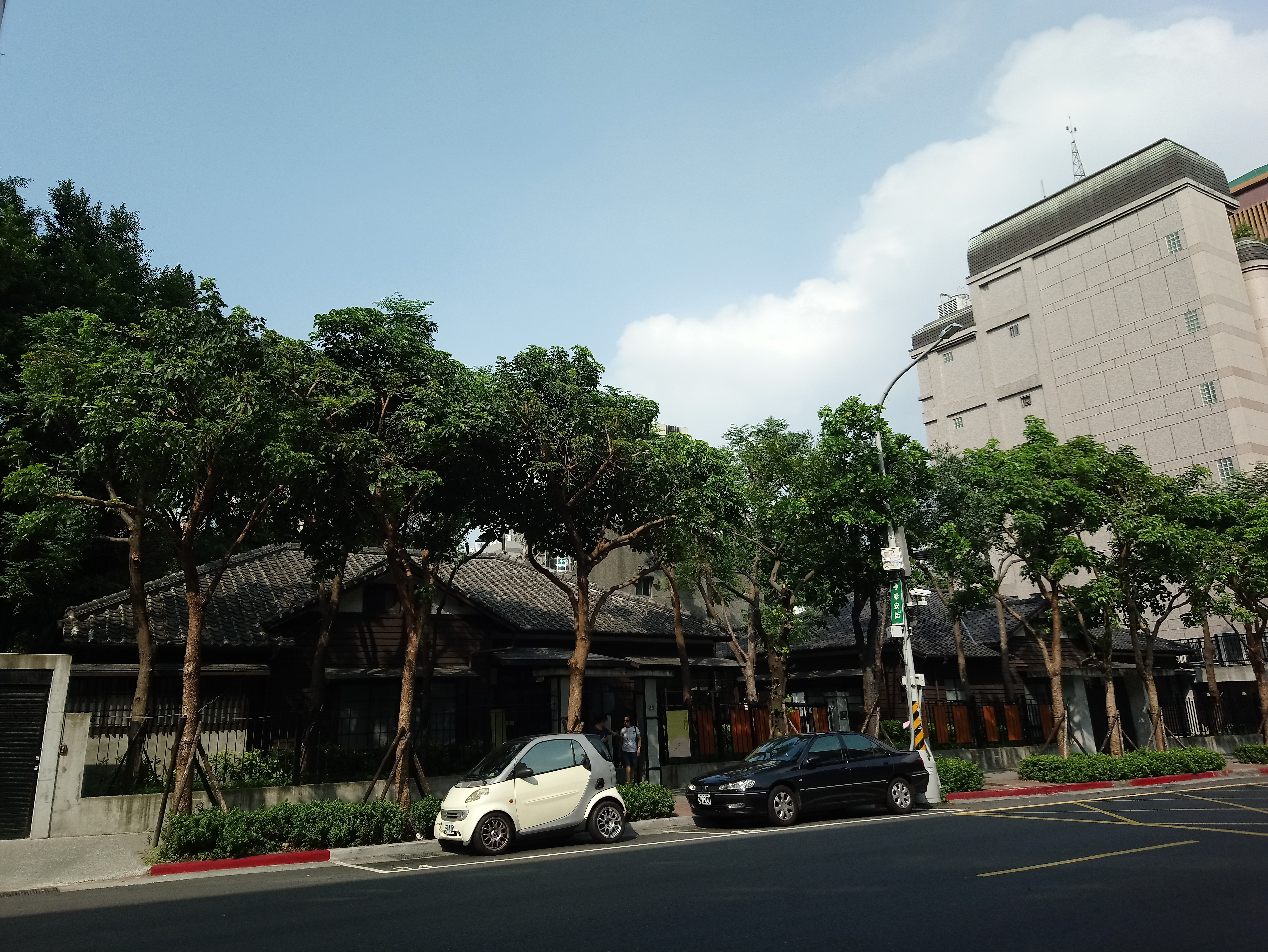 齊東詩社,台北市中正區東門次分區幸福里